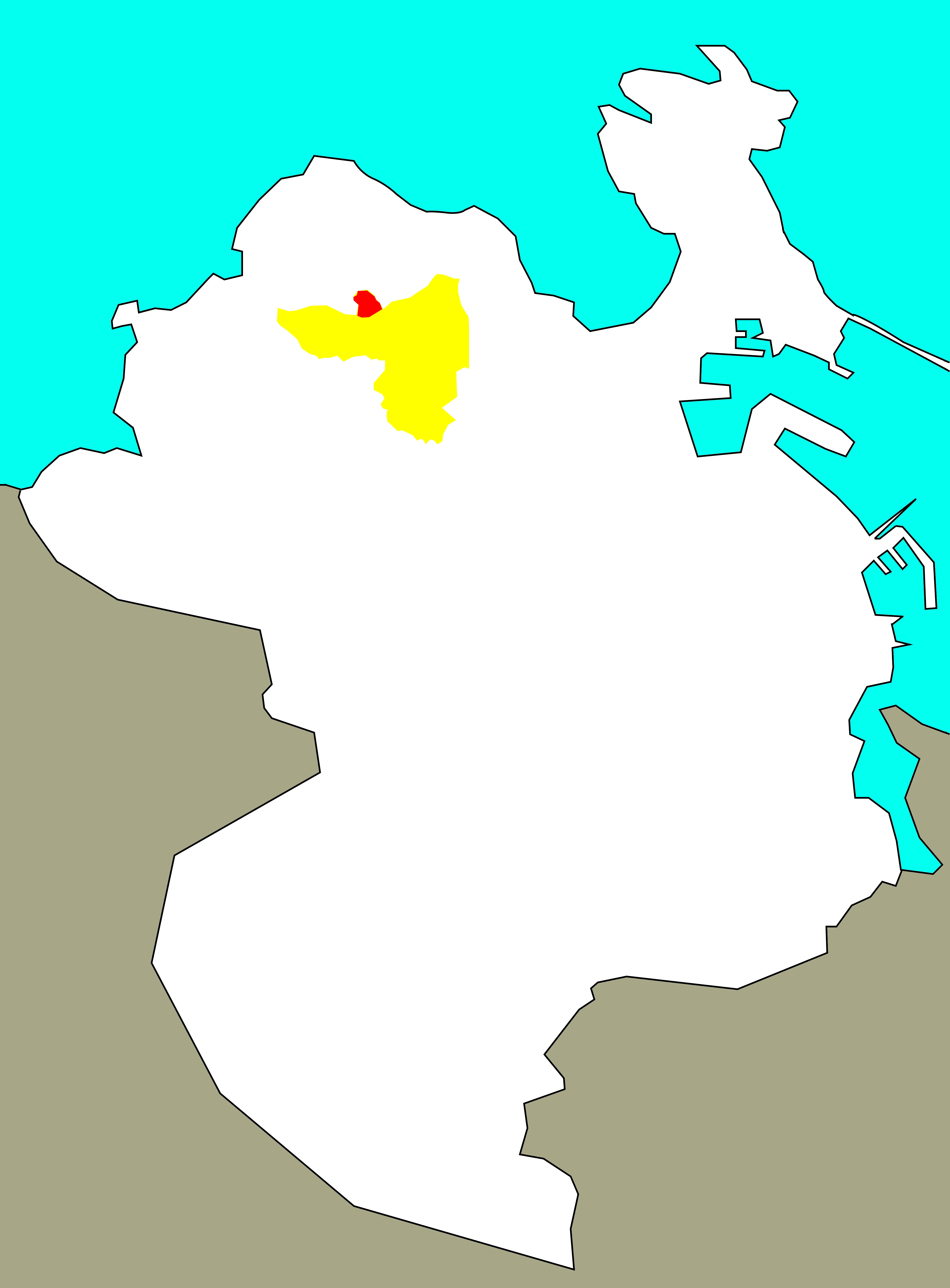 Situación da Pedra da Barca no "barrio-territorio" de San Pedro de Visma.[1]